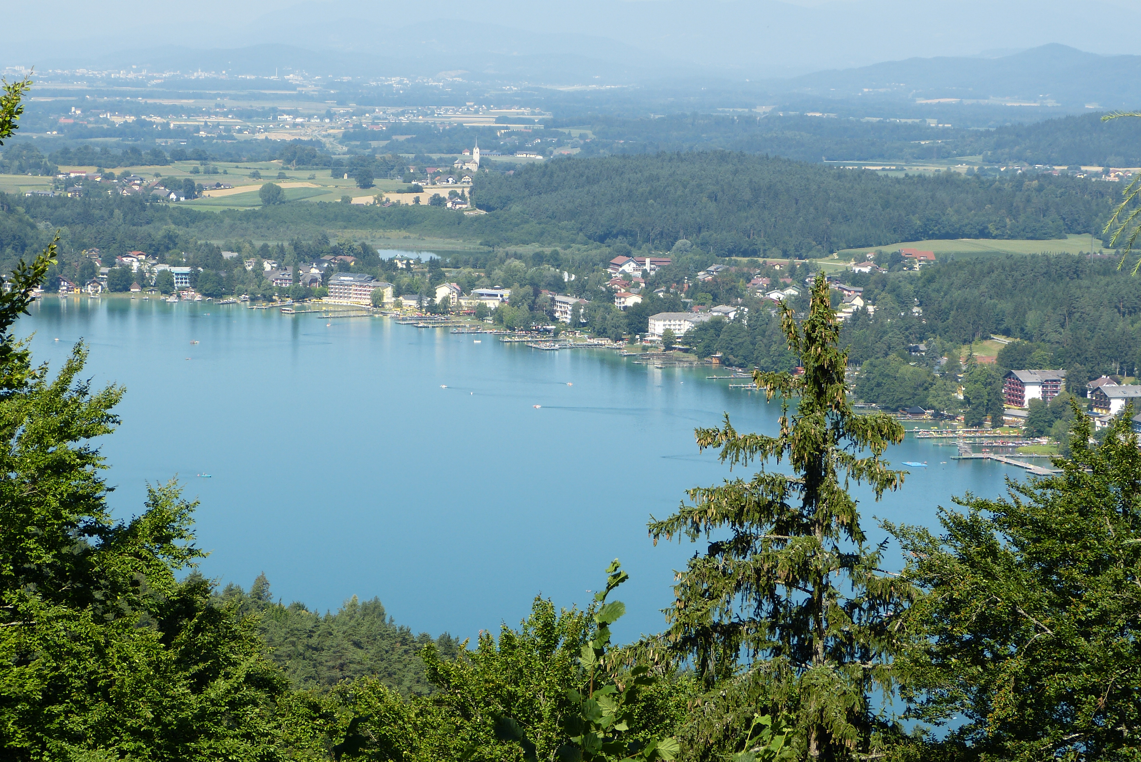 Blick auf den Klopeiner See vom Georgiberg (südöstlich des Sees), im Hintergrund Sankt Kanzian